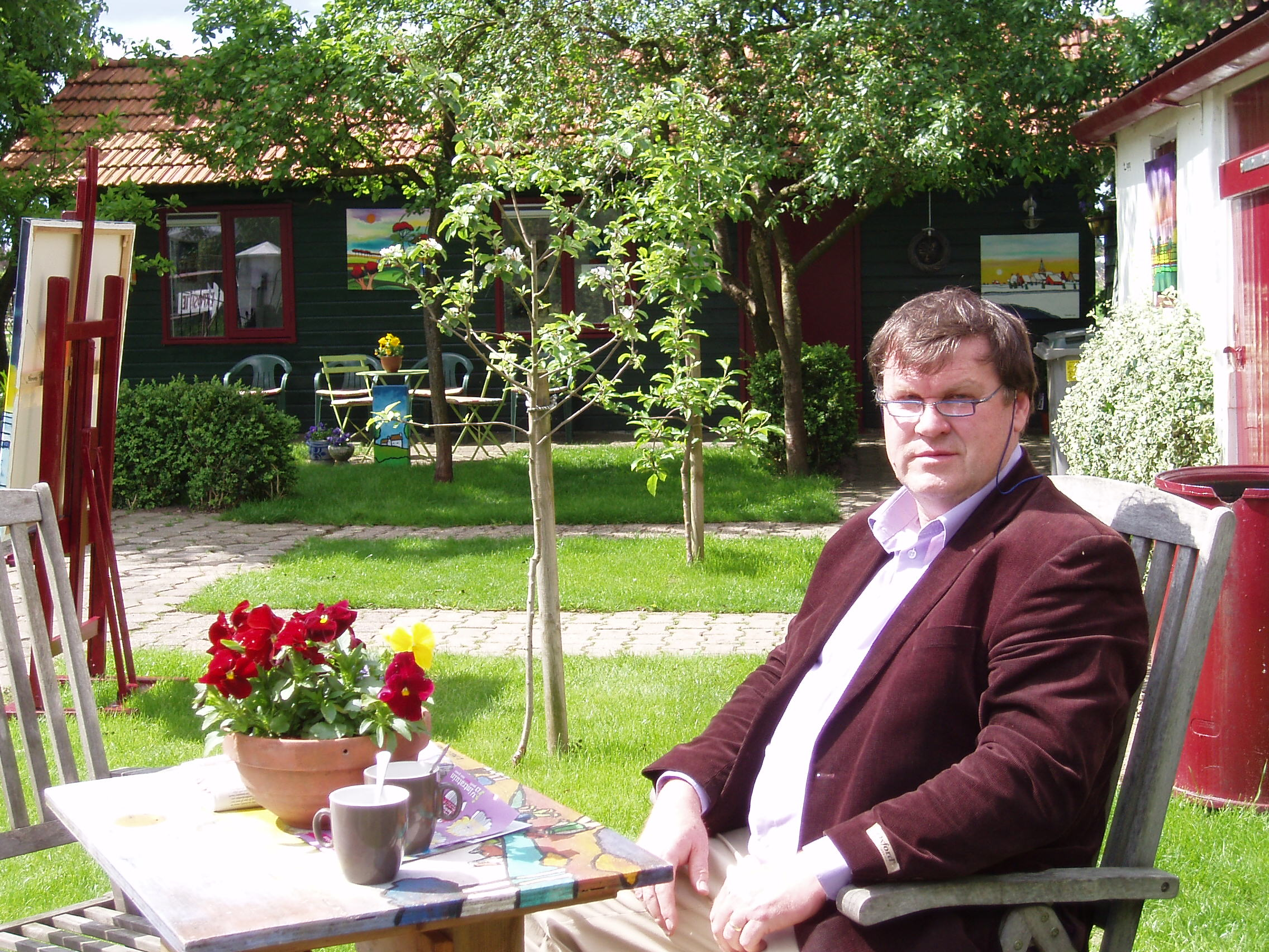 Cor Melchers in zijn tuin voor zijn atelier in Huissen